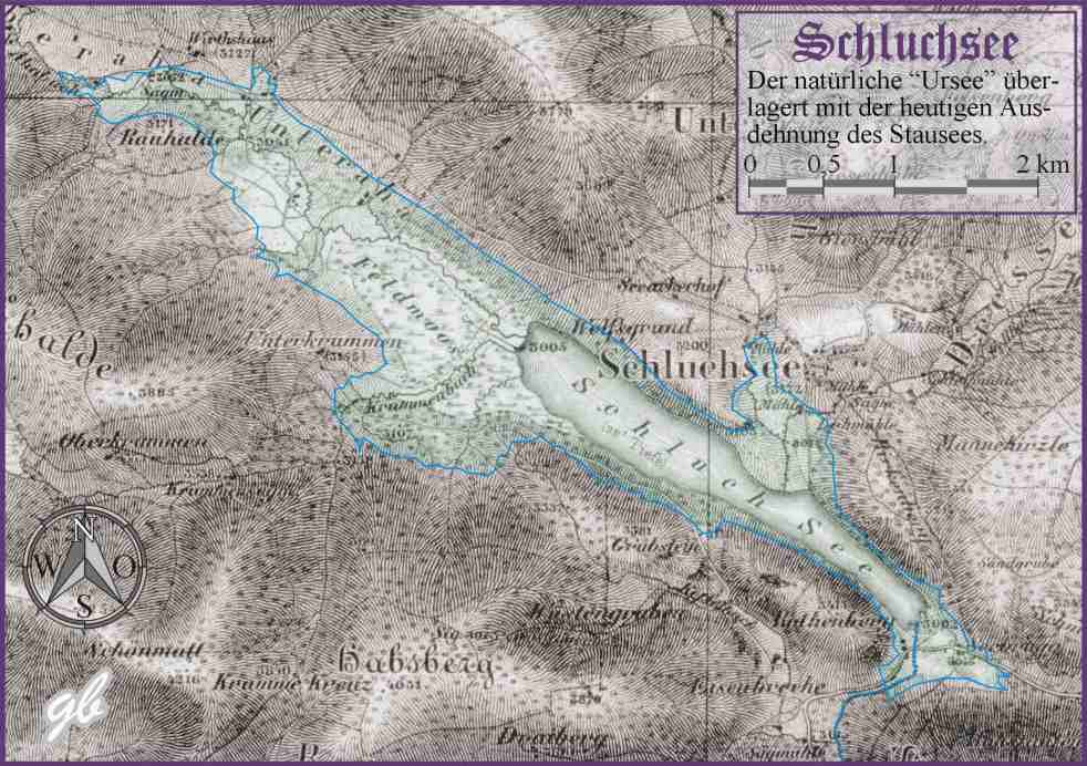 Überlagerung einer Karte des natürlich Schluchsees, wie er bis Anfang der 30-er Jahre des 20. Jahrhunderts als sogenannter Ursee bestand, mit der neutigen Ausdehung des Stausees bei Vollstau